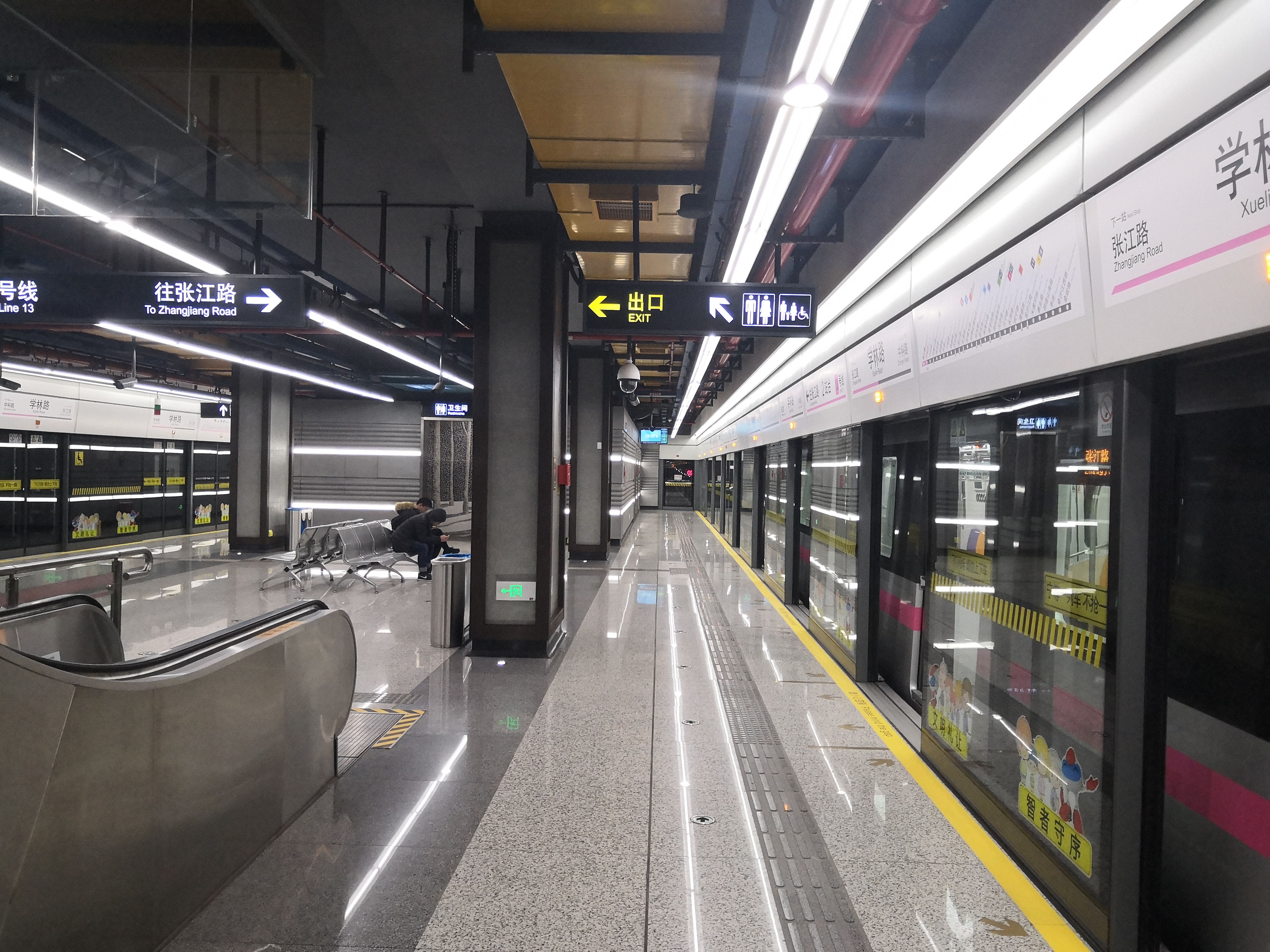 学林路站站台